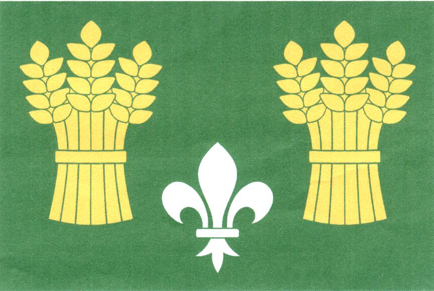 Vlajka obce Sedletín